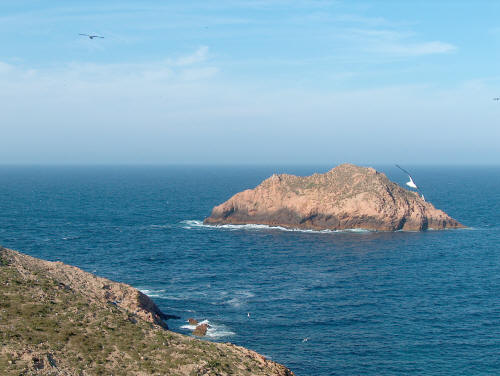 Cerro da Velha_foto